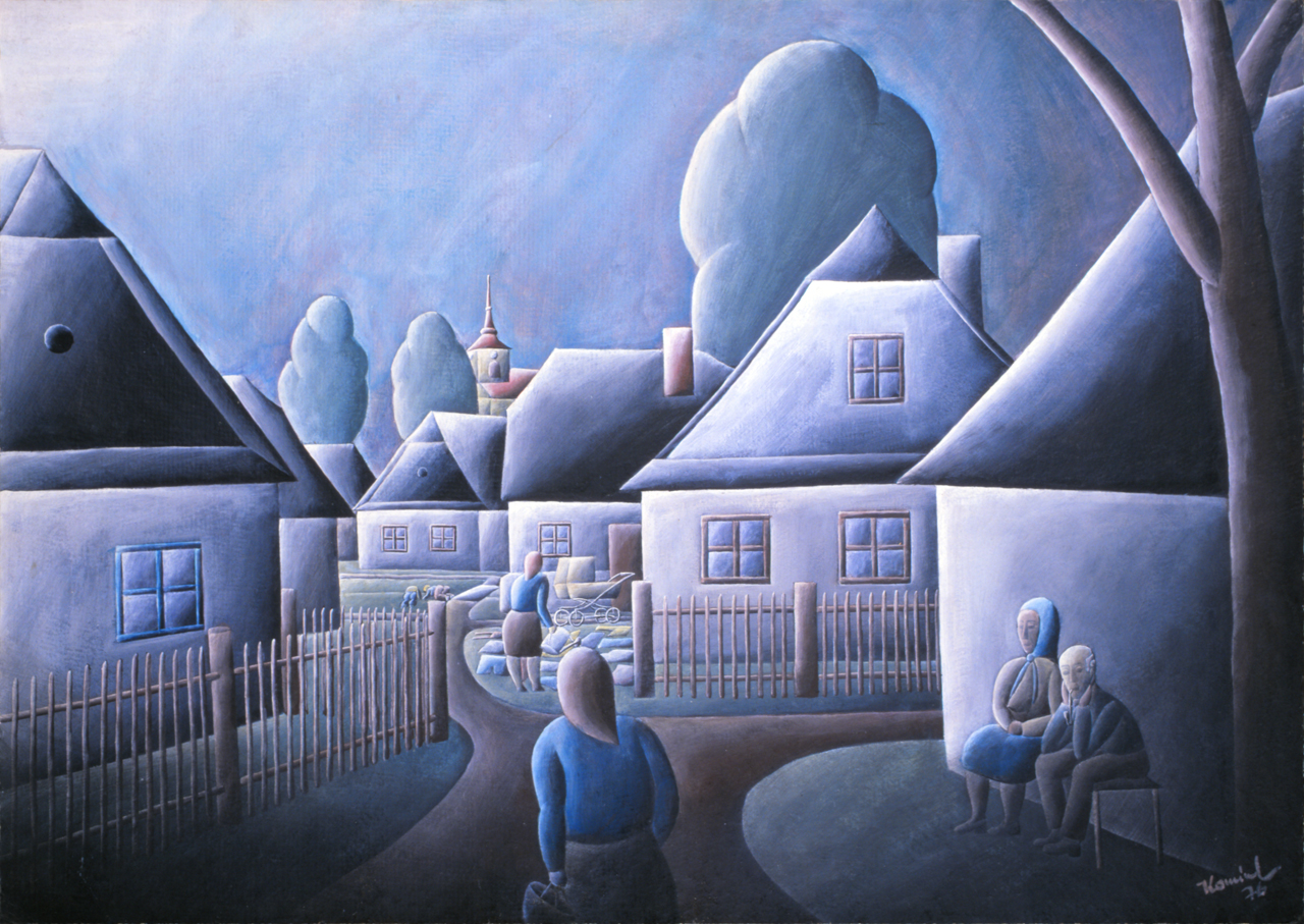 09. Bohumír Komínek, U nás na Betlémě (1976)